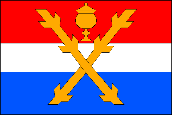 vlajka, Lančov, okres Znojmo